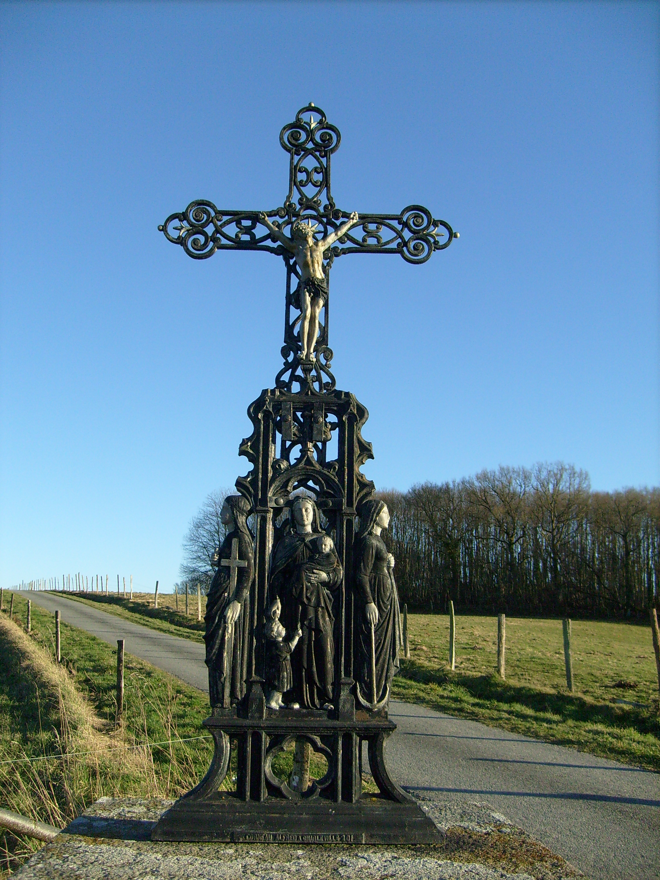 Croix de Saint Léobon (détail).